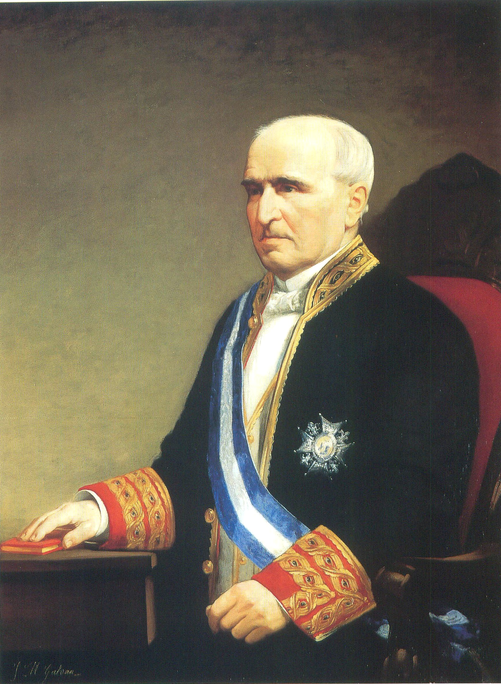 Retrato del político español Francisco Santa Cruz Pacheco (1797-1883), que llegó a ser ministro de Hacienda y de la Gobernación durante el reinado de Isabel II de España y también presidente del Senado y gobernador del Banco de España.